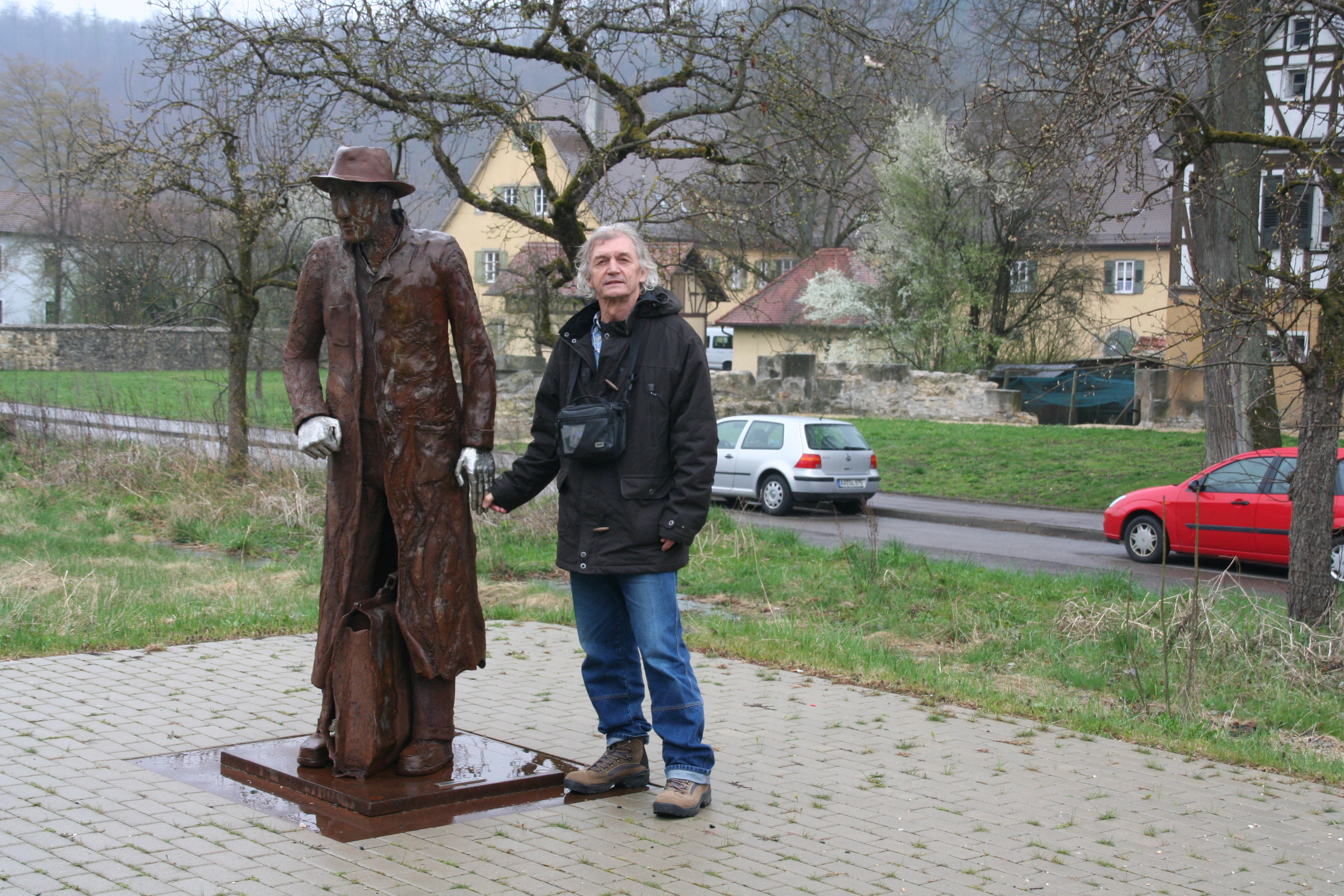 Statue de Friedrich Frankowitsch, quai 2 en gare de Königsbronn (Allemagne)